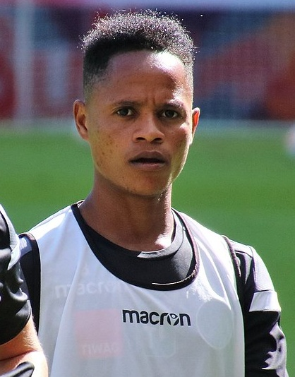 Karim Conté